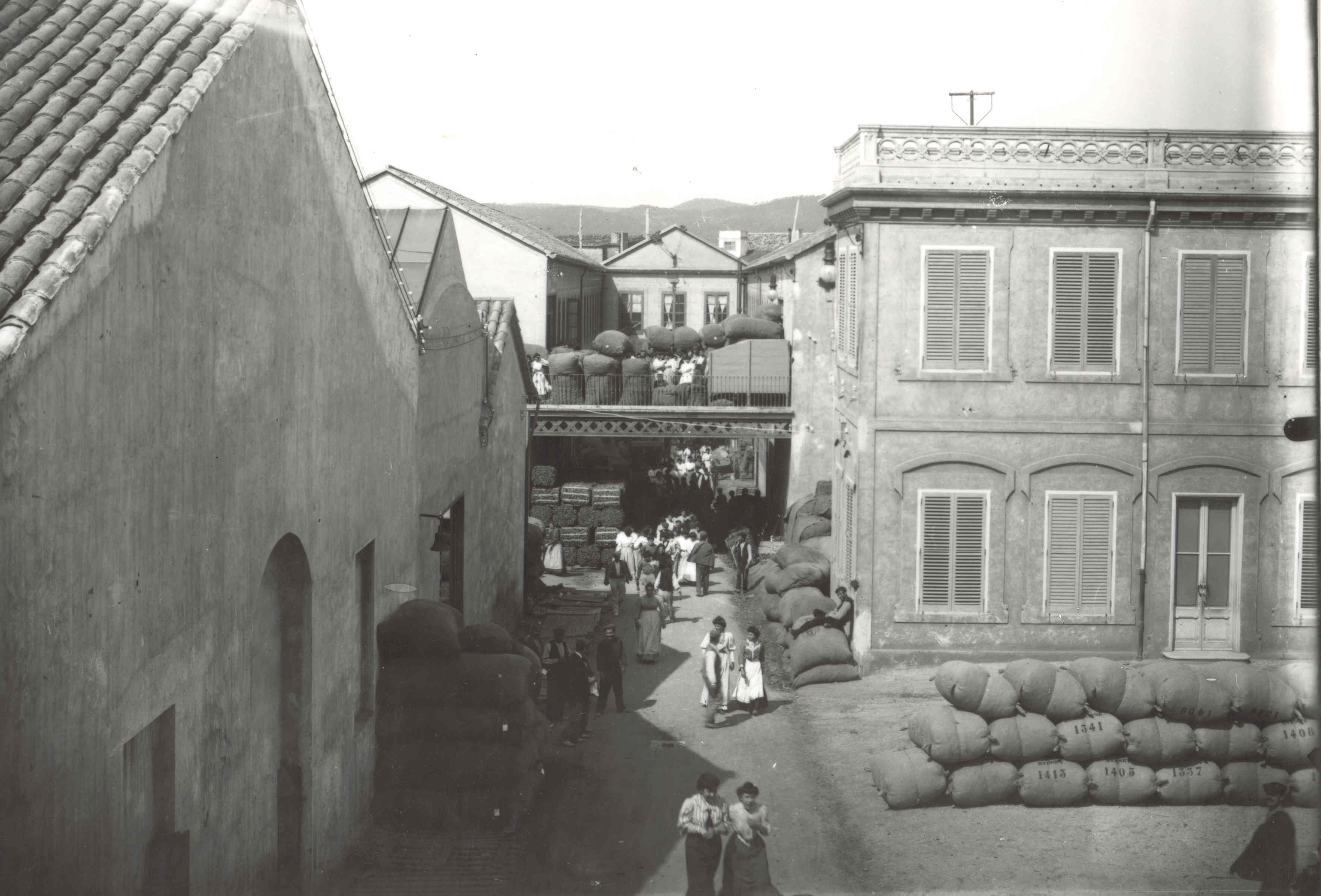 Passeig central de Can Mario des de la torre. Feta entre 1903 - 1907. Col·lecció Armstrong. Fons Arxiu d'imatge Museu del Suro de Palafrugell.